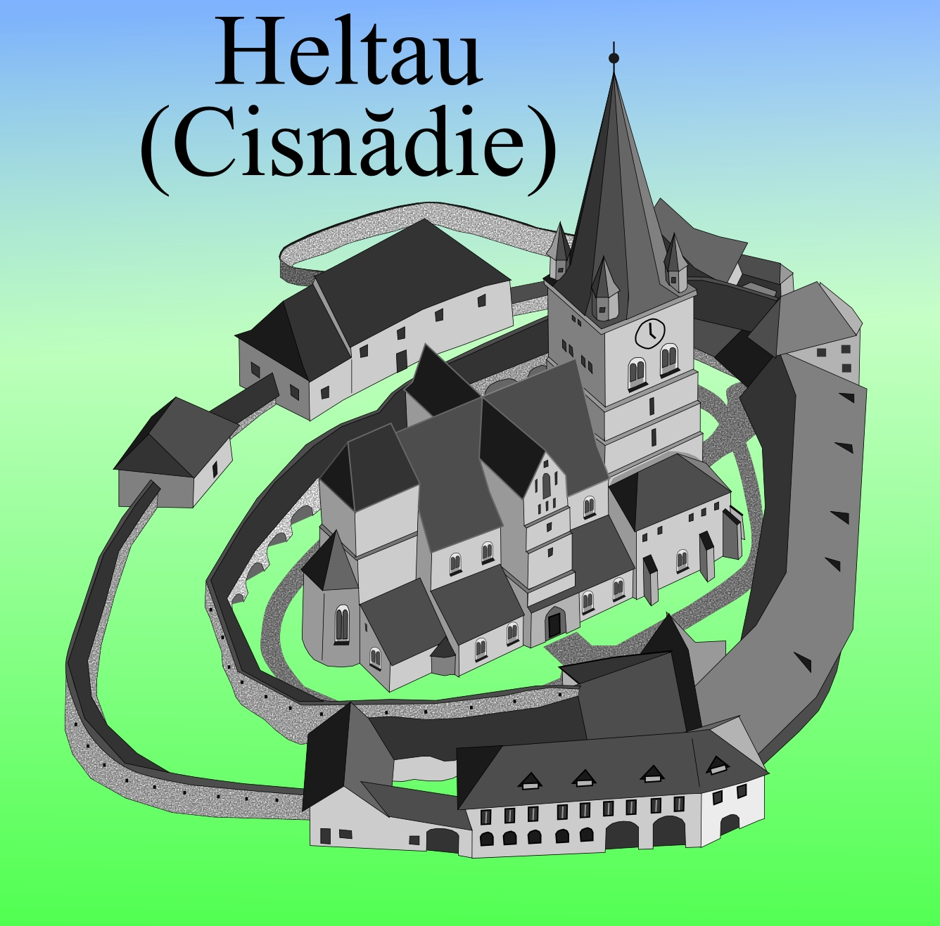 Biserica fortificata din Cisnadie